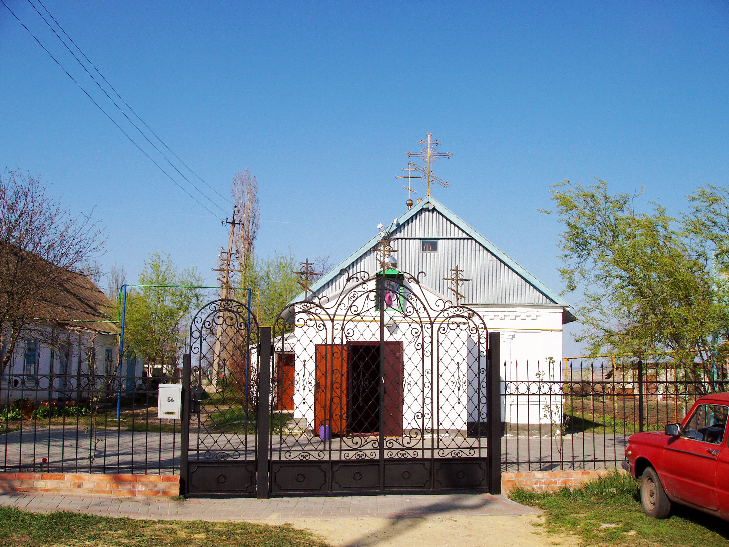 Храм в селе Семёновка Мелитопольского района